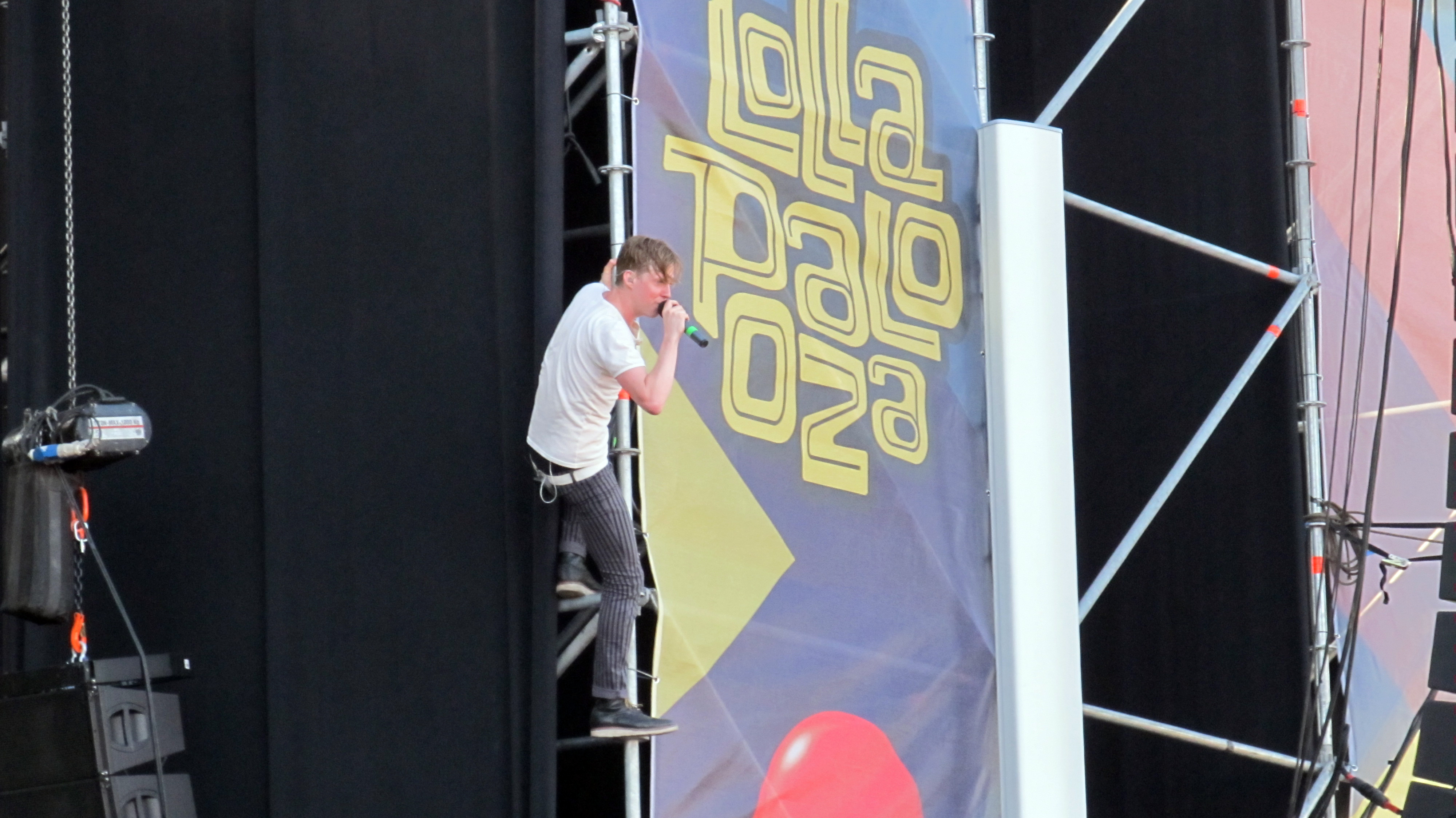 Kaiser Chiefs en Lollapalooza Chile 2013